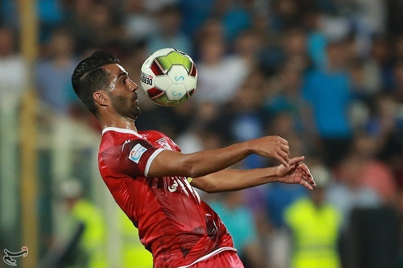 تیم‌های استقلال تهران و تراکتورسازی تبریز در هفته سوم رقابت‌های لیگ برتر فوتبال از ساعت ۲۰:۳۰ امروز (جمعه) ۱۹مرداد در ورزشگاه آزادی به مصاف هم رفتند که این دیدار با نتیجه ۳ بر صفر به سود استقلال خاتمه یافت.شاگردان شفر با کسب این پیروزی به اولین برد فصل خود در لیگ هجدهم رسیدند و با ۵ امتیاز به رده چهارم جدول صعود کردند. تراکتورسازی نیز با ۲ امتیاز در رده پانزدهم جدول ایستاد. گل‌های این بازی توسط علی عبدالله‌زاده (۱۳ -گل به خودی)، مرتضی تبریزی (۲۸) و فرشید اسماعیلی (۵۲) وارد دروازه تراکتورسازی شد.